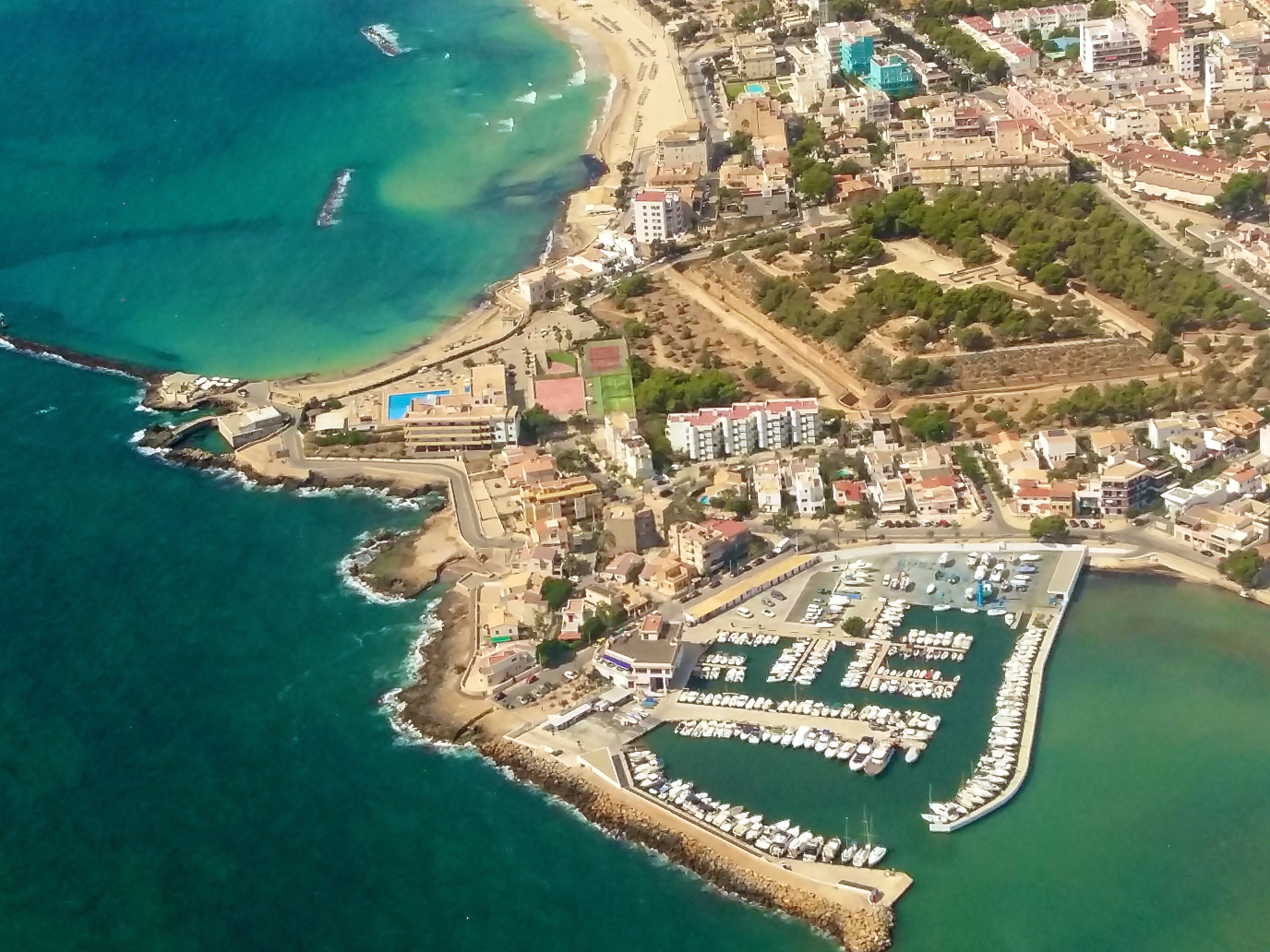 Vista aèria Club Nàutic Cala Gamba